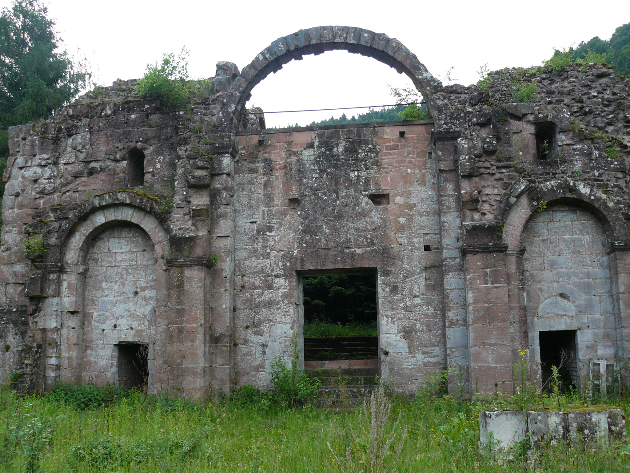 Vestiges du couvent de Niedermunster. Vue du porche de l'église et des deux tours-escalier.